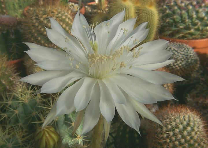 Echinopsis calochlora subsp. calochlora